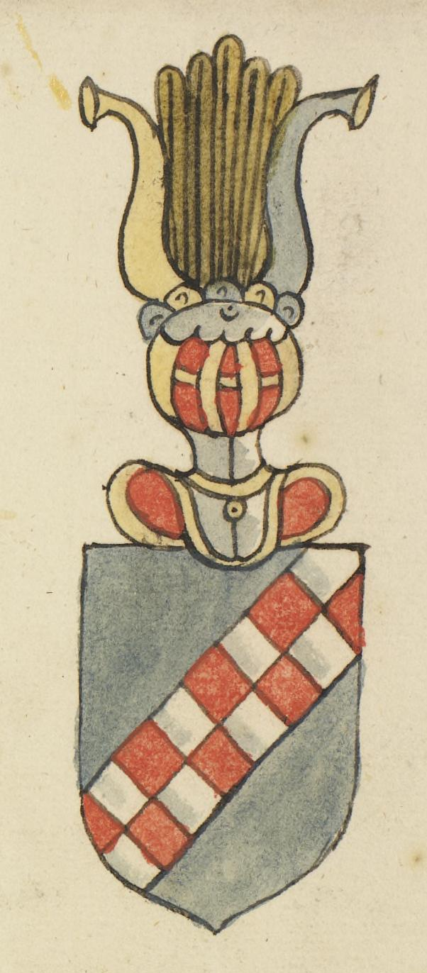 Illustrasjon hentet fra et privatarkiv i Nasjonalbiblioteket med tittelen "Insignia quædam virorum illustrium in Norvegia quodam habitantium" av Iver Nielssøn Hirtzholm.